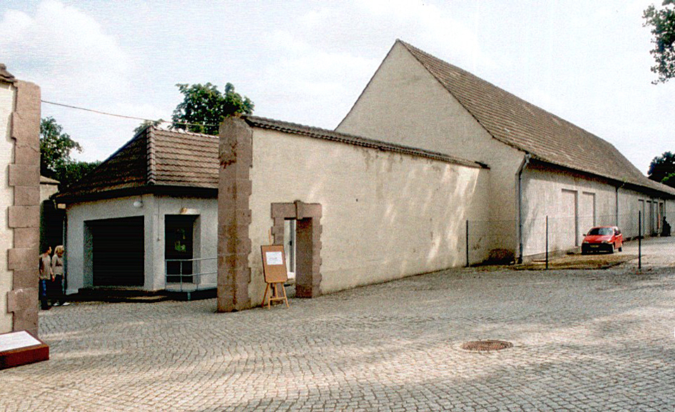 Mahn- und Gedenkstätte KZ Ravensbrück - Lagertor (Außenansicht mit Wachgebäude.